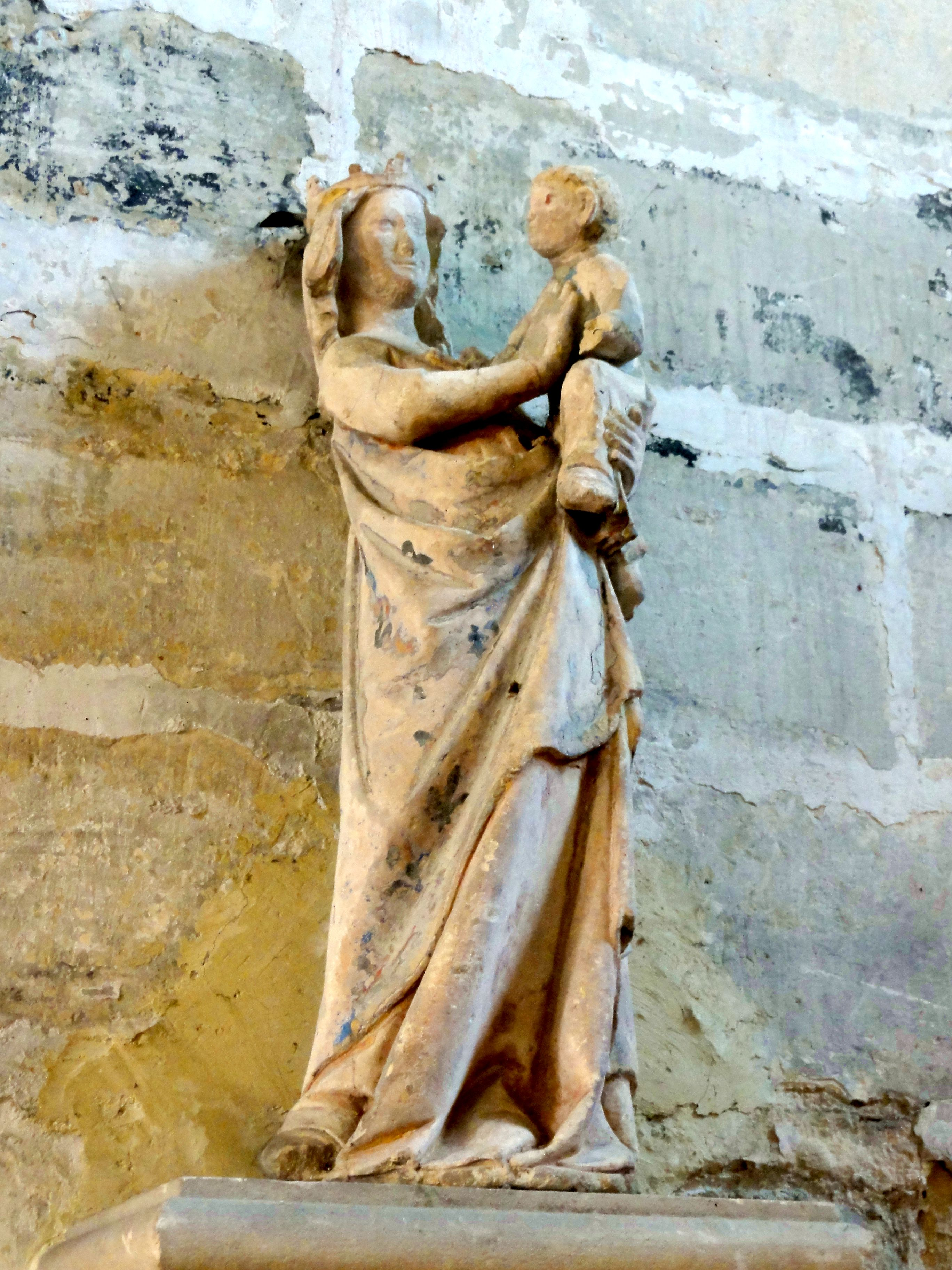 Vierge à l'Enfant.